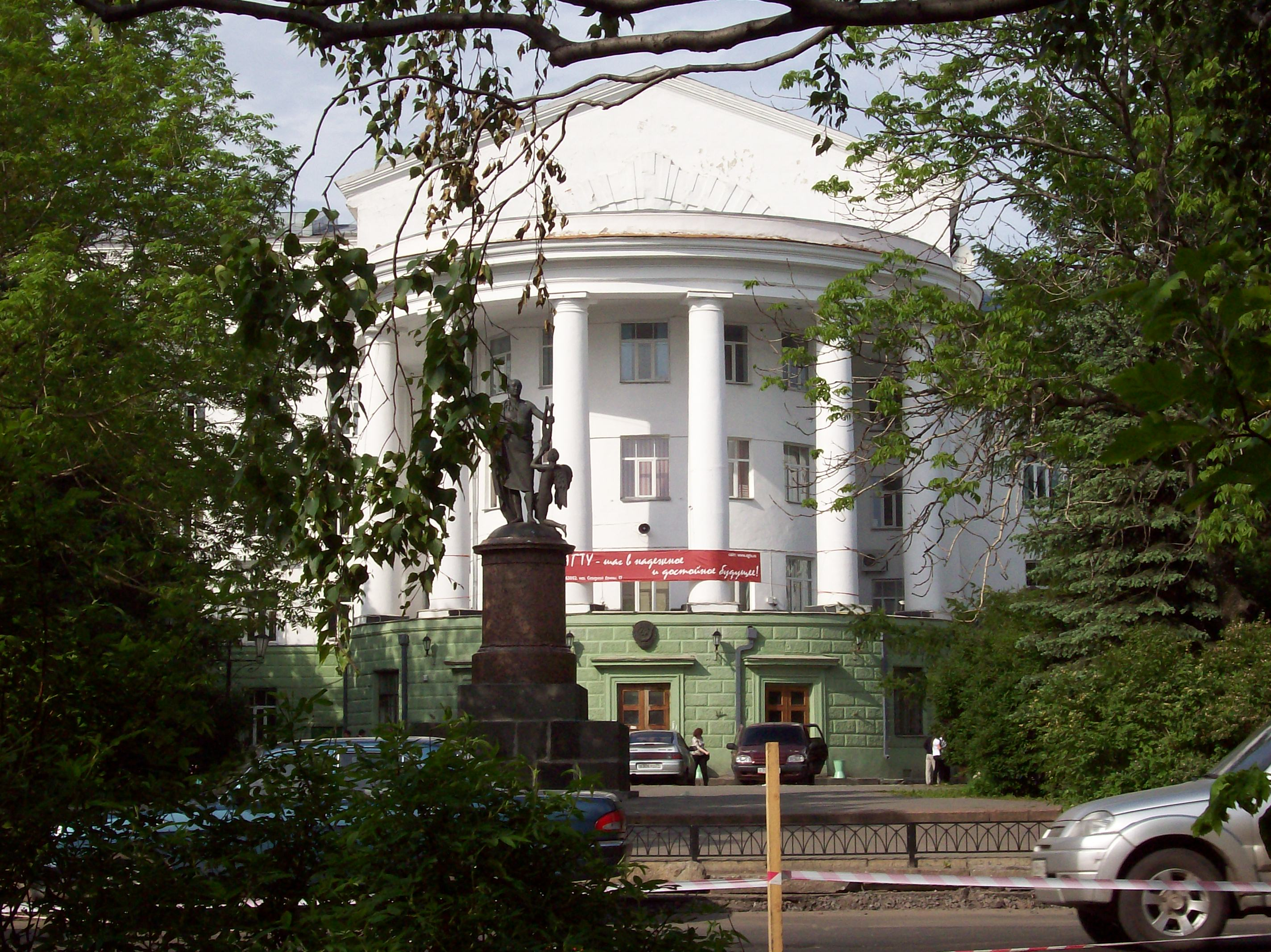 Памятник Ломоносову и главный корпус Архангельского государственного технического университета, Архангельск, июнь 2007